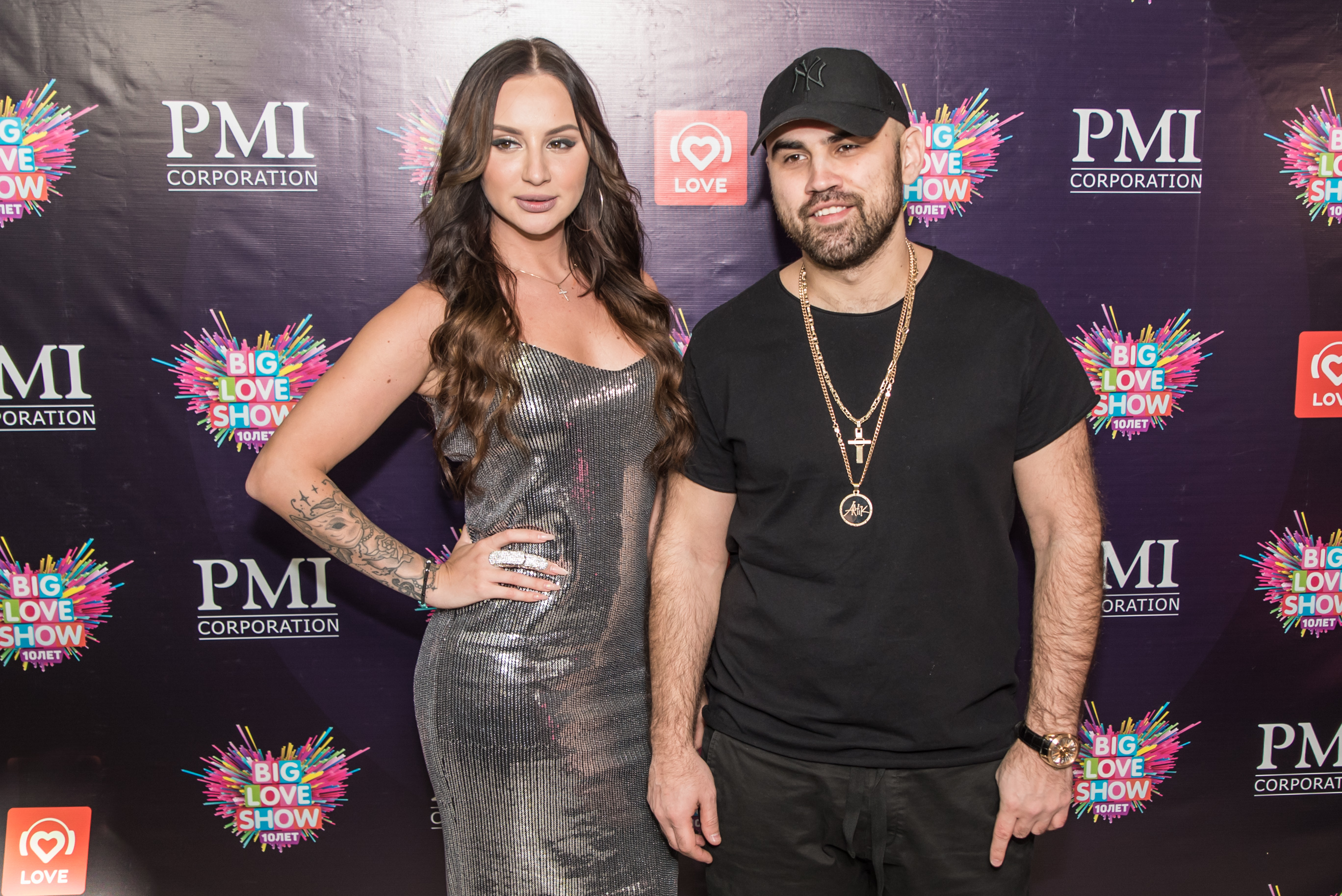 Artik & Asti на прессволе на Big Love Show 2018 в СПб